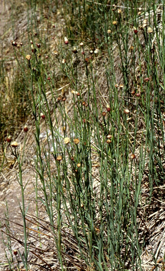 Baccharis juncea, Korbblütler (Asteraceae) - Argentinien/Argentina, Paso de Uspallata, Puente del Inca, ca. 2700 m s.m. (Prov. Mendoza)